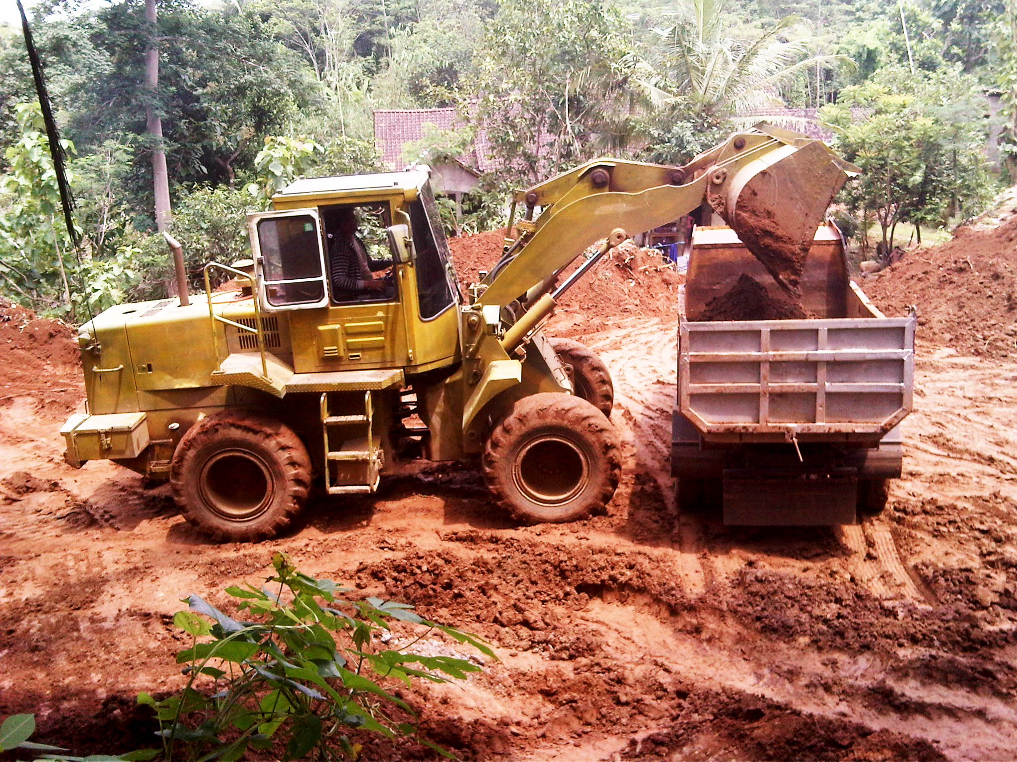 Tanah semi padas merupakan pertemuan antara lapisan tanah padas dan merah secara garis besar tanah semi padas memiliki karateristik dan sifat antara tanah merah dan tanah semi padas.kebanyakan tanah semi padas di gunakan untuk genteng, bata dan gerabah. Selain itu cukup bisa untuk digunakan untuk di sector pertanian ataupun untuk pondasi rumah